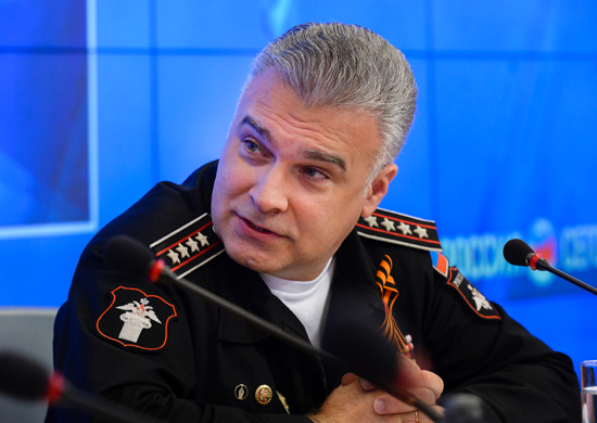 начальник Управления культуры Министерства обороны РФ Антон Губанков